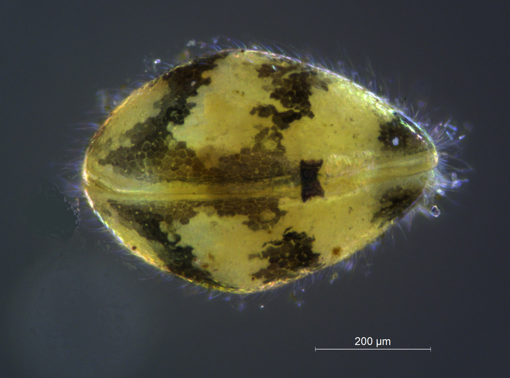 Krepsdyret stripemuslingkreps (Cypridopsis vidua)